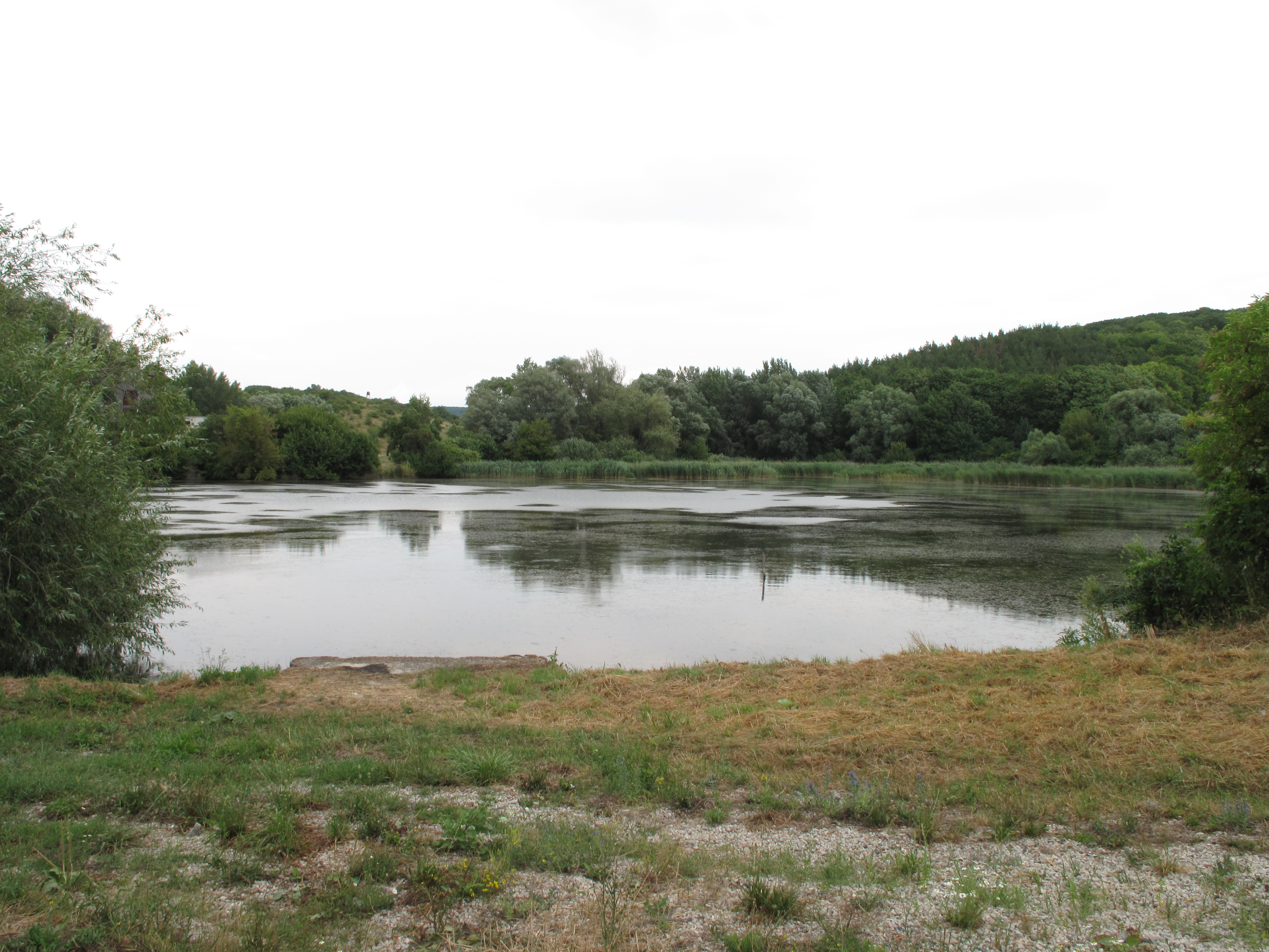 Mušlovský horní rybník. Okres Břeclav, Česká republika.